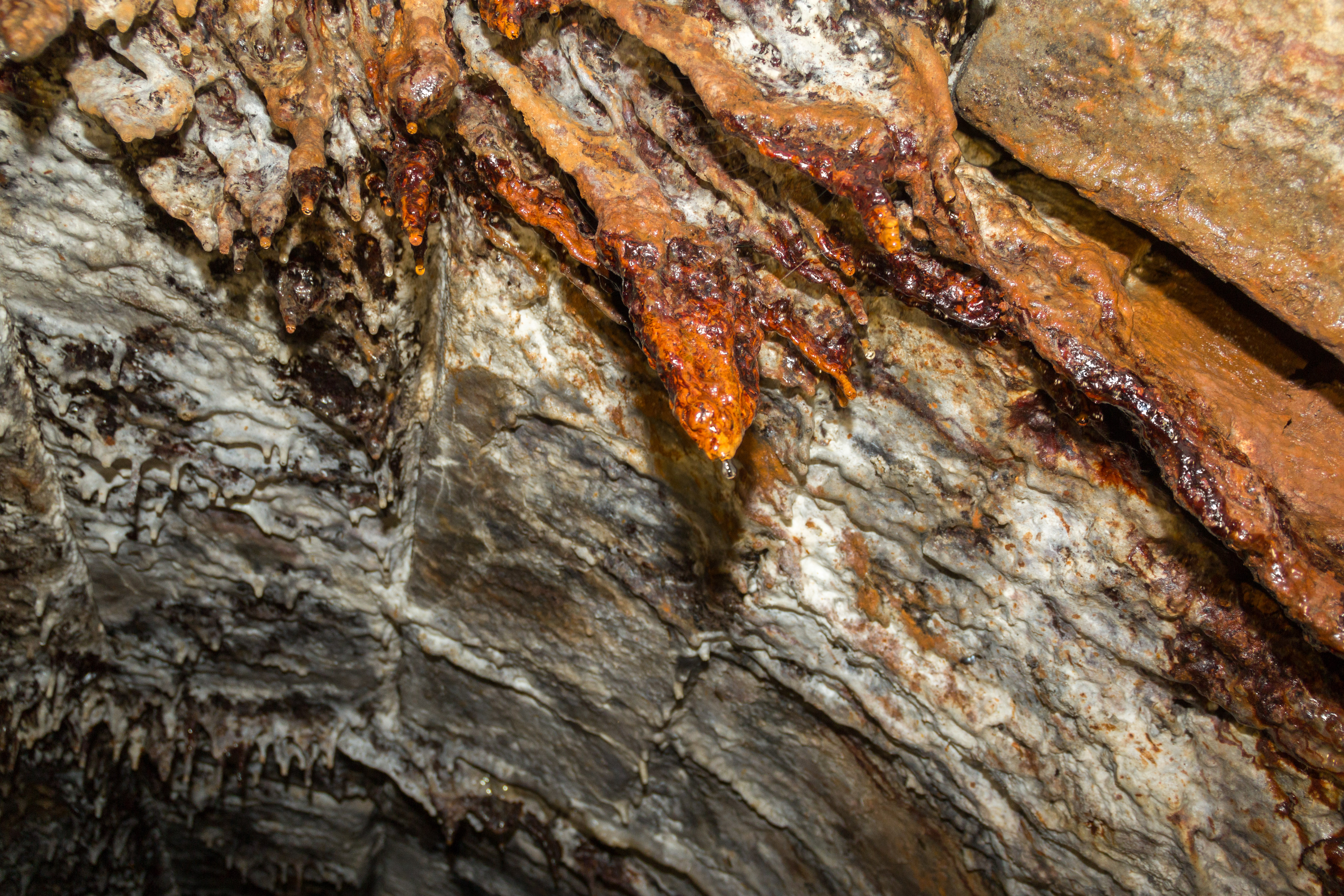 Ludwig-Donau-Main-Kanal, Burgthann, Distellochdamm, Tiefenbach, Durchlass, Innen, Sinter